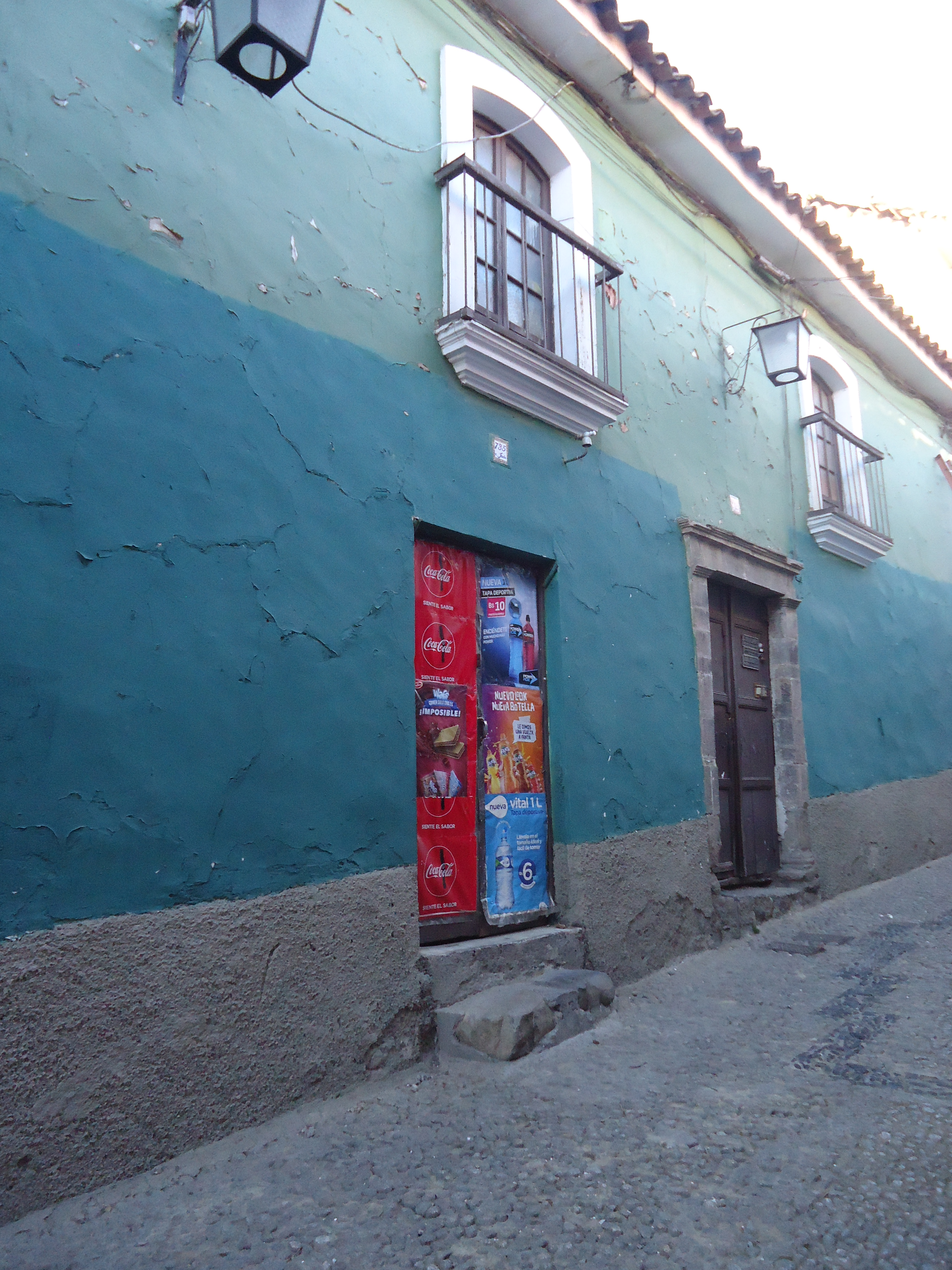 Casa Jaén This medium shows the protected monument with the number L/00-036 in Bolivia.